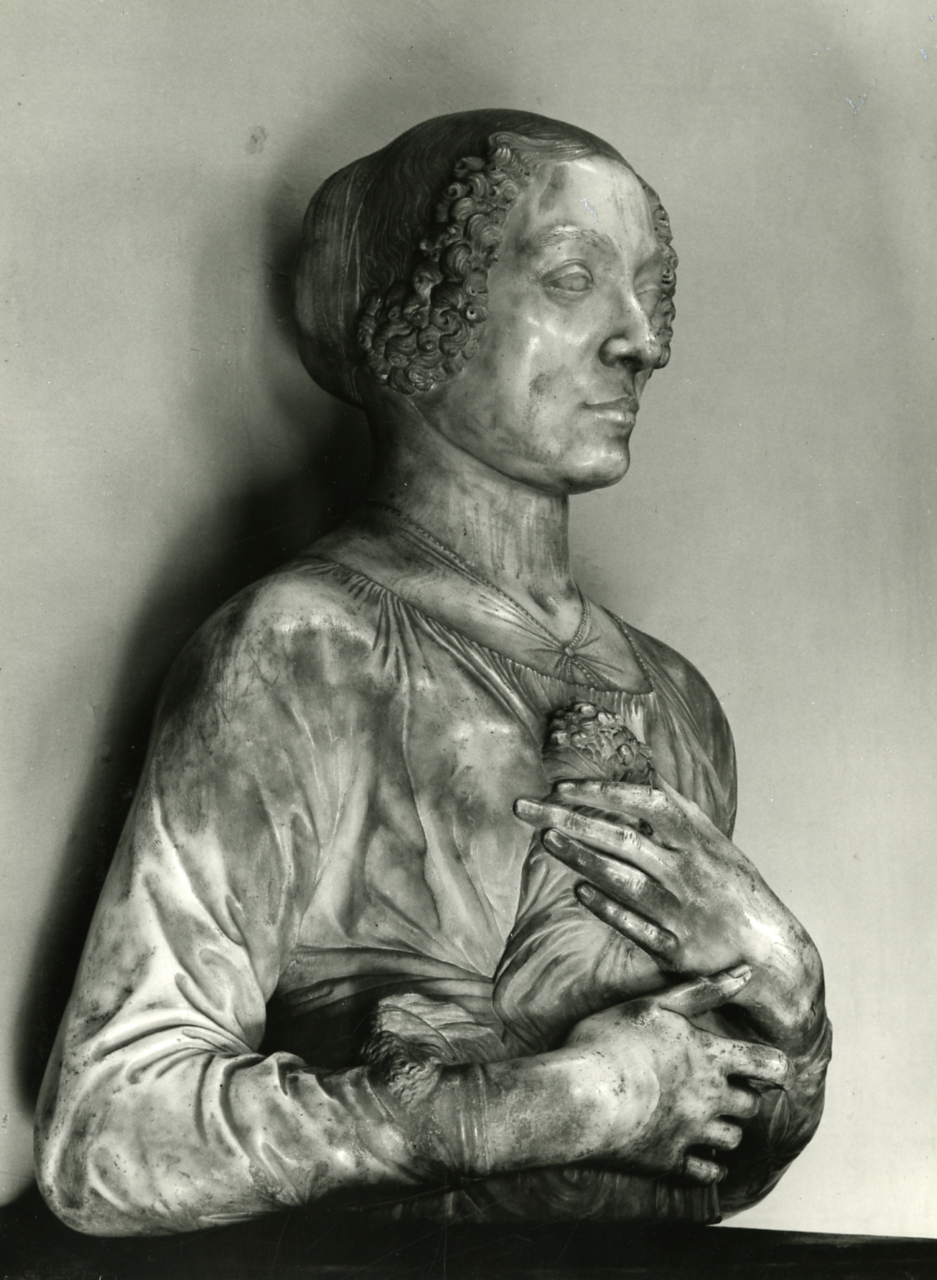 Servizio fotografico : Firenze, 1966 / Paolo Monti. - Stampe: 2 : Positivo b/n, gelatina bromuro d'argento/ carta, 24x30. - ((Al verso delle stampe iscrizioni didascaliche manoscritte a matita; timbri a inchiostro con copyright (Via Tasso e Corso Sempione - Milano). - Sul coperchio della scatola iscrizione didascalica manoscritta a pennarello nero: "Pittura". - Occasione: Documentazione per la pubblicazione: Cecchi Emilio, Sapegno Natalino (a cura di), "Il Quattrocento e l'Ariosto", "Storia della Letteratura Italiana", Vol. 3, Milano, Garzanti, 1965. - (1964-1966), presso Archivio Paolo Monti. - Fonte: Monografia di Cecchi Emilio, Sapegno Natalino (a cura di): Il Quattrocento e l'Ariosto, in Storia della Letteratura Italiana, Vol. 3, Milano, Garzanti (1965). - Fonte: Agenda di Paolo Monti: Monti/ 2/ 6 giugno 1964 - 31 marzo 1966/ 8194-12420